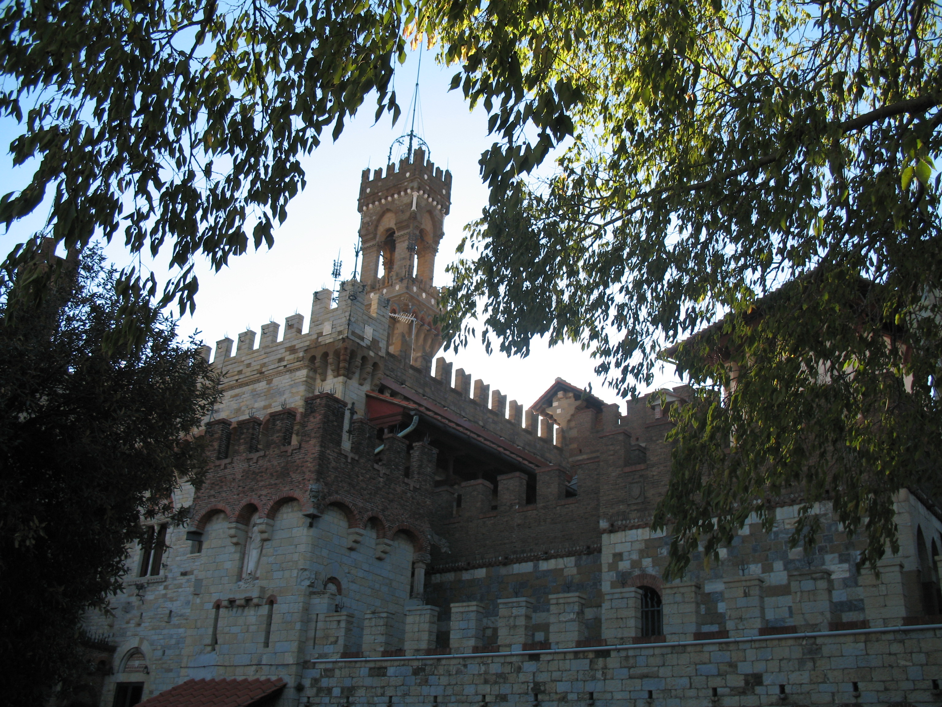 Immagine da Genova